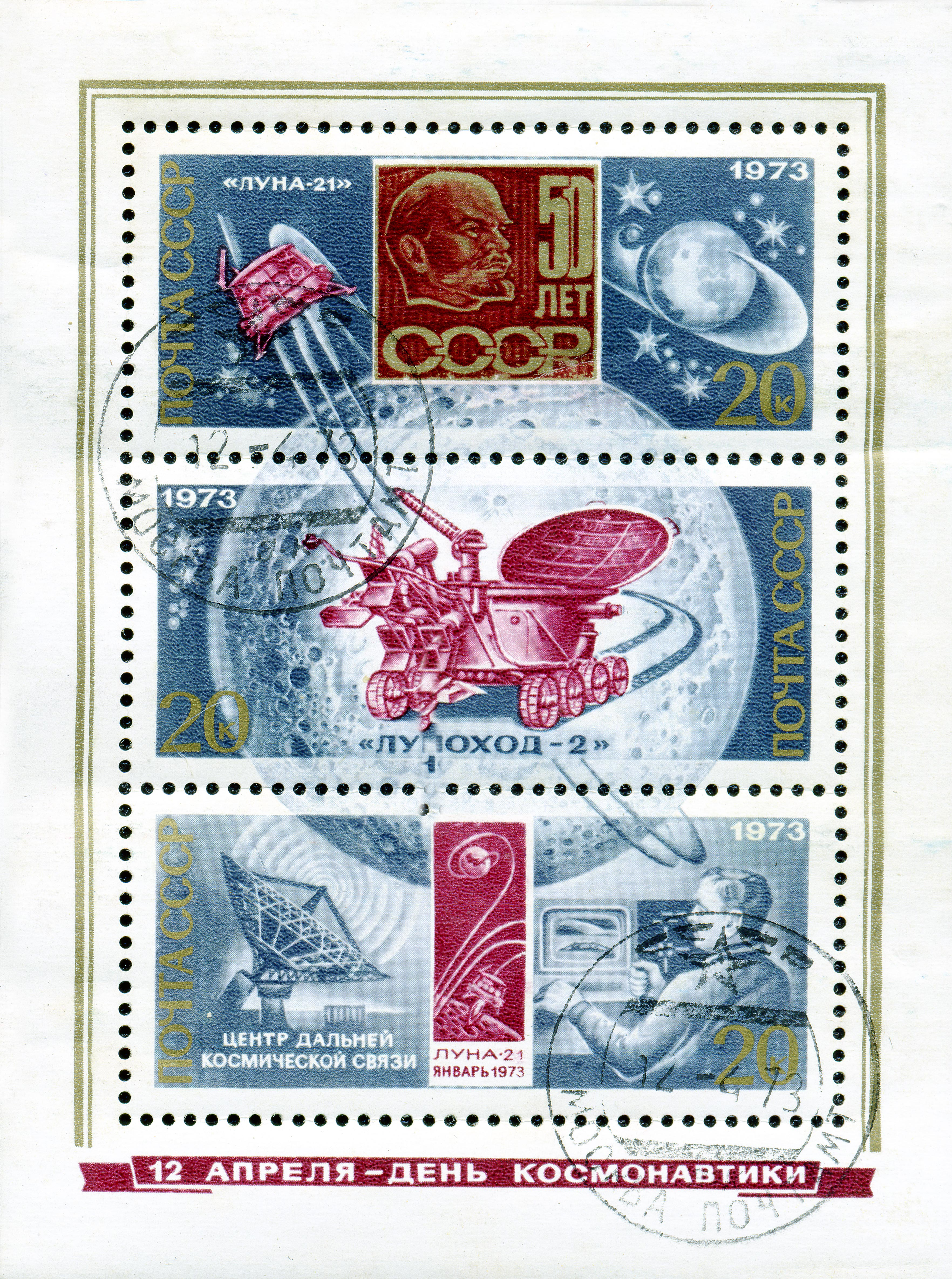 Почтовая марка СССР. 1973. Луна-21, Луноход-2, центр дальней космической связи